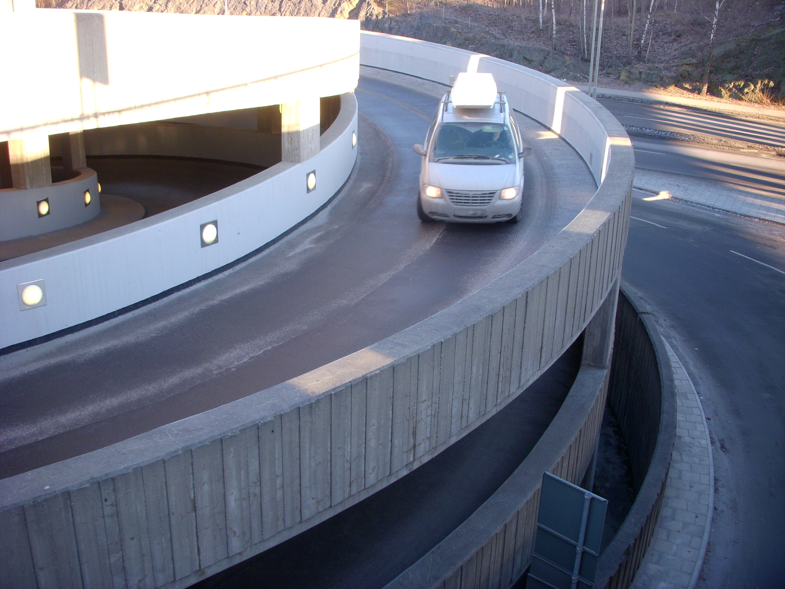 Spiralen i Skärholmens p-hus, Stockholm